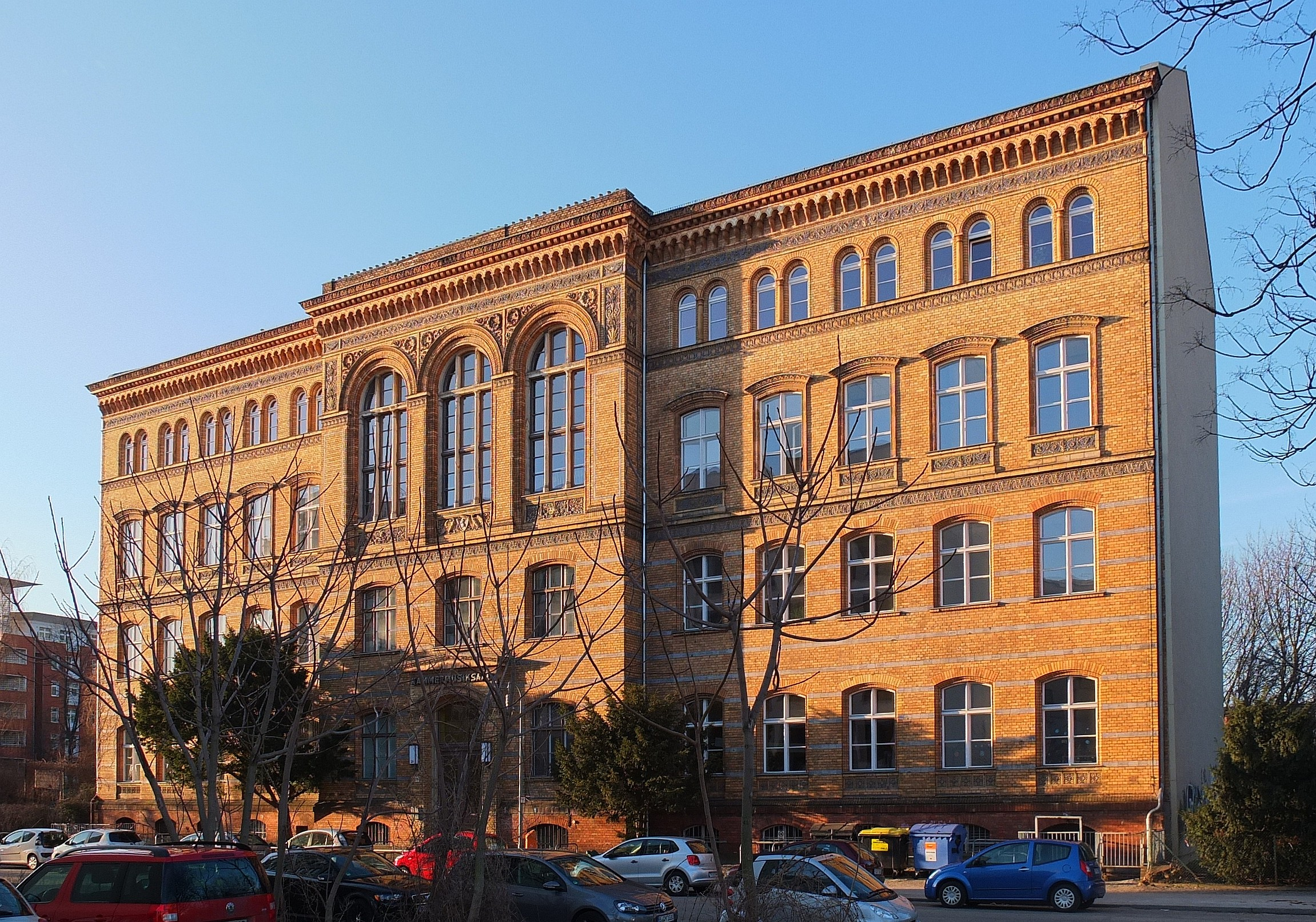 Gebäude der Clara-Grunwald-Grundschule, ehemals Askanisches Gymnasium, Hallesches Straße, Berlin-Kreuzberg